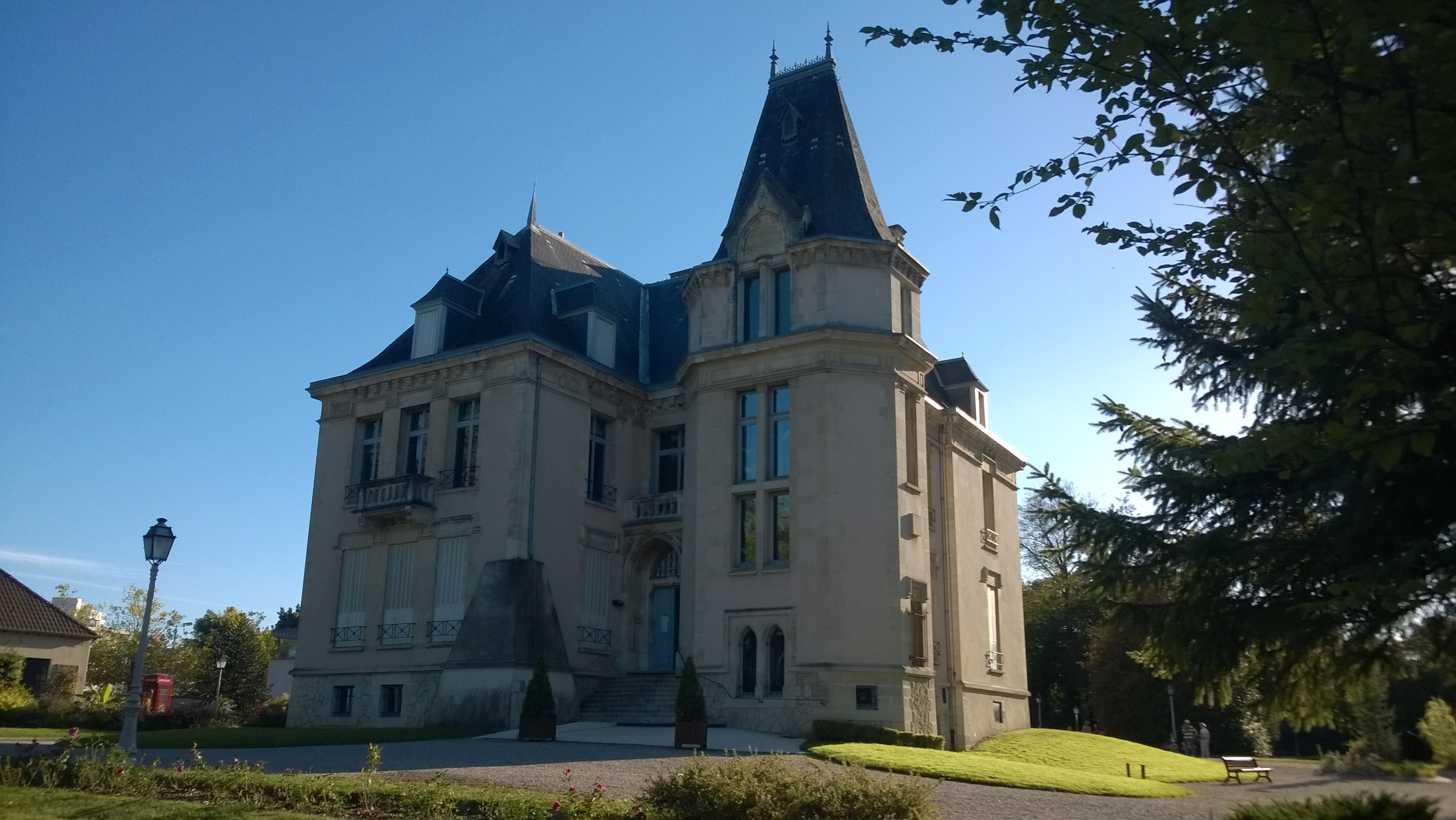 Château du Charmois à Vandoeuvre-les-Nancy (France)